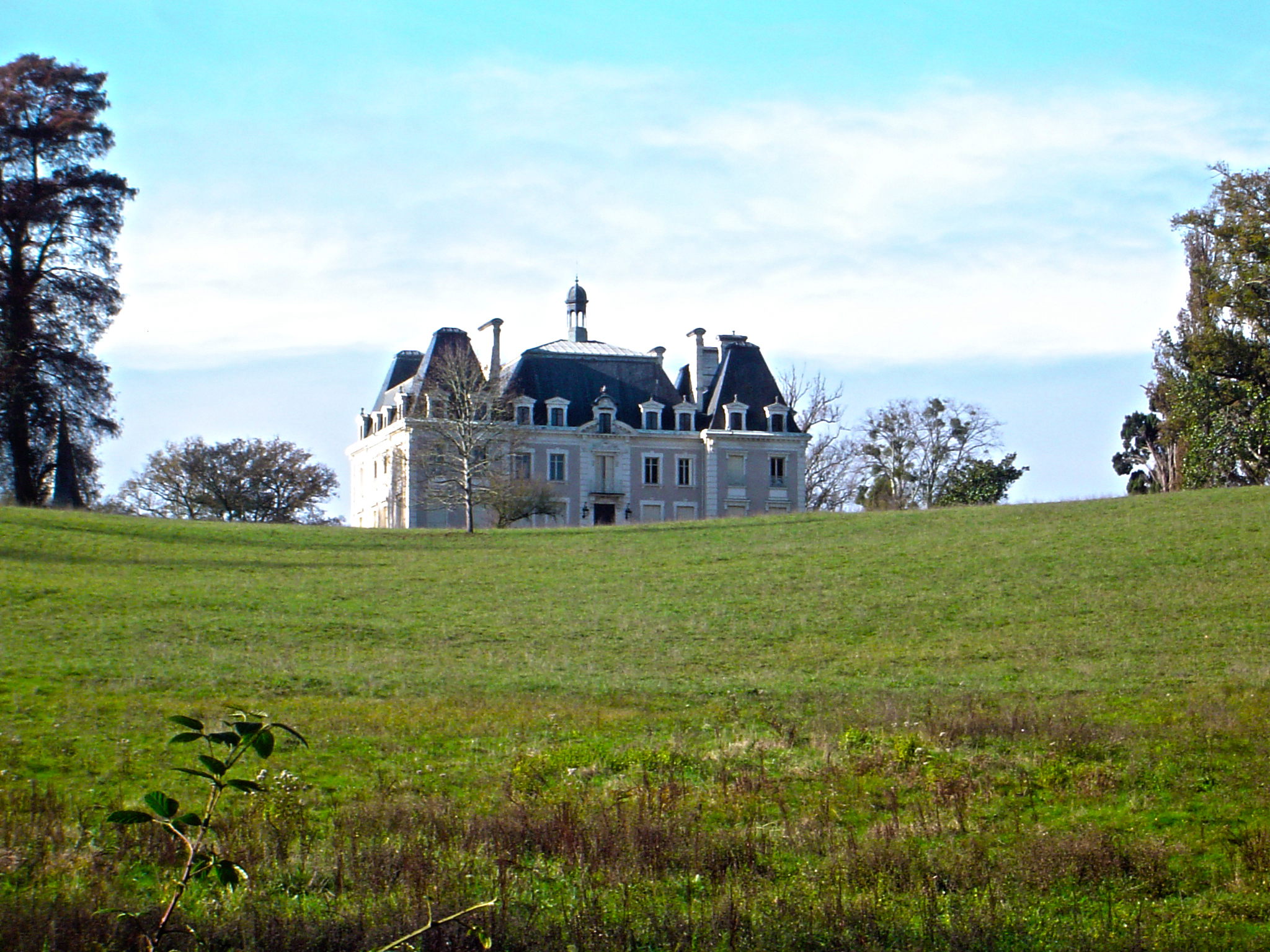 Castèth de Captan, Audinhon, Gasconha